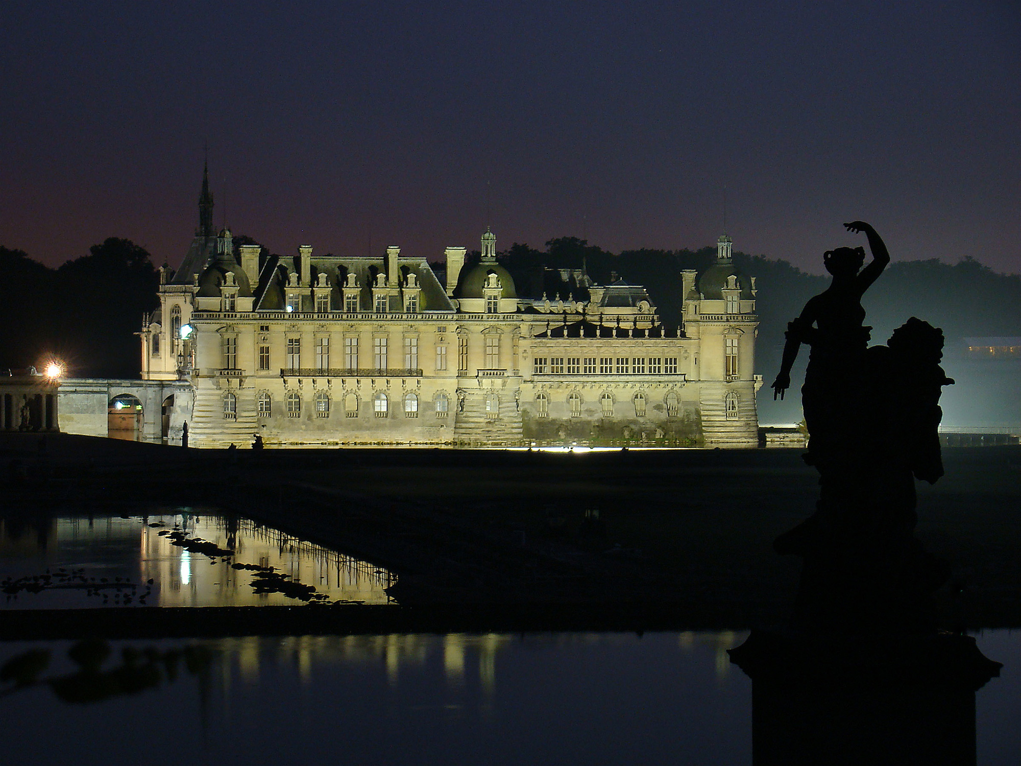 Château de Chantilly, Oise, Picardie, France. Façade nord du Grand Château.